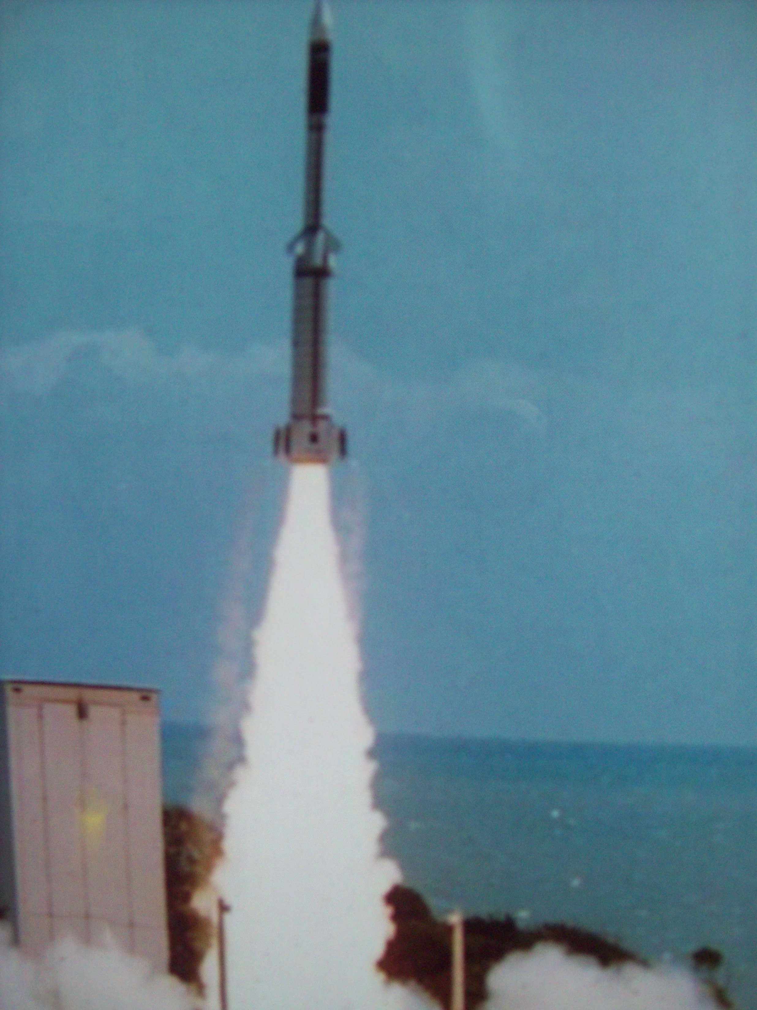 Barreira do Inferno - Sonda